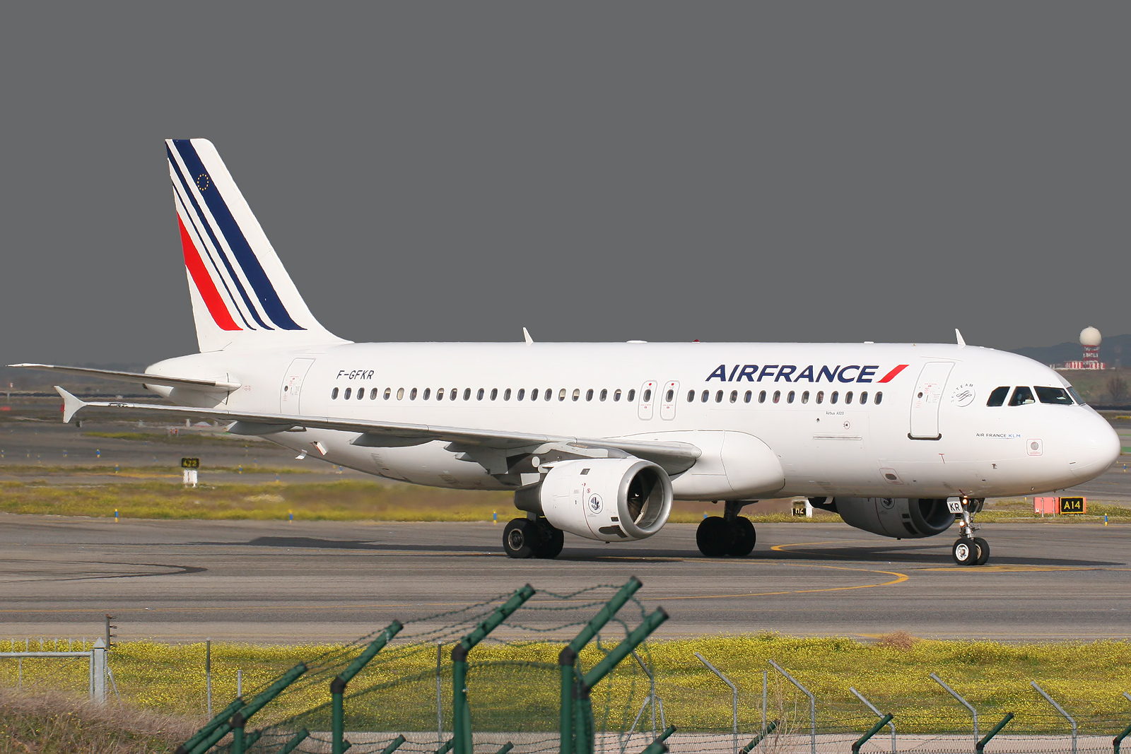 Madrid - Barajas Airport (LEMD/MAD)